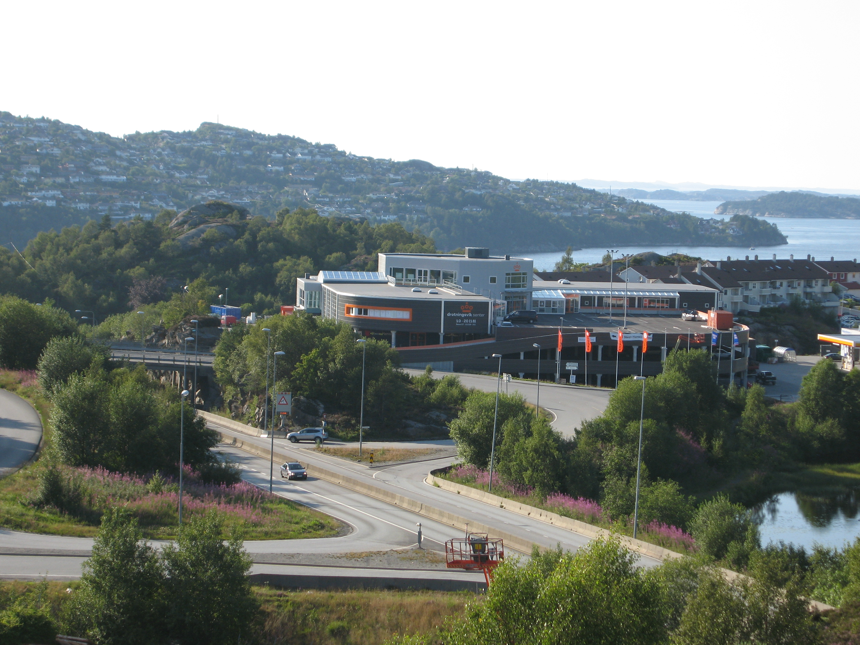 Drotningsvik senter, Godvik, Bergen, Hordaland, Norway